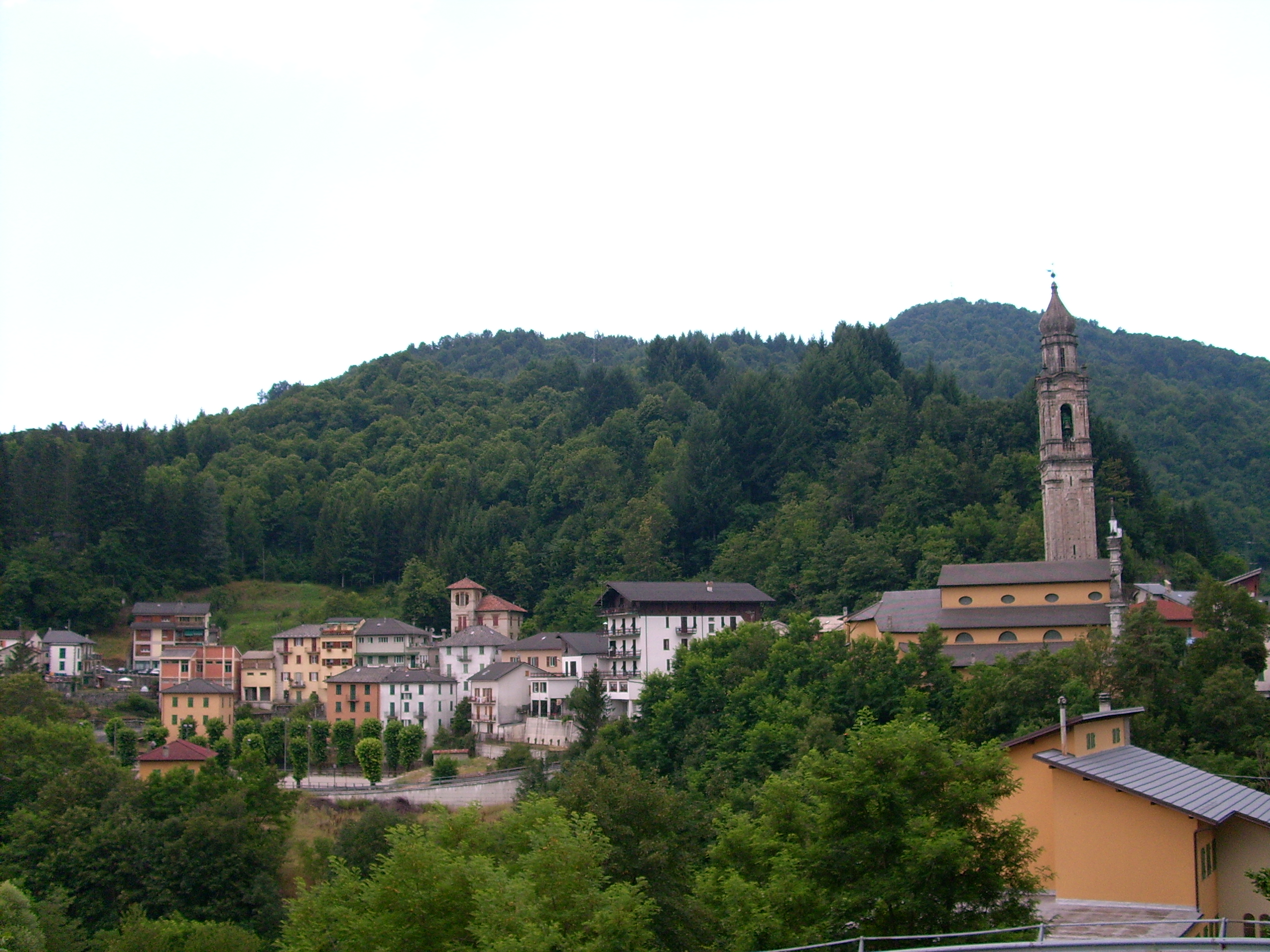 Rezzoaglio, Liguria, Italia